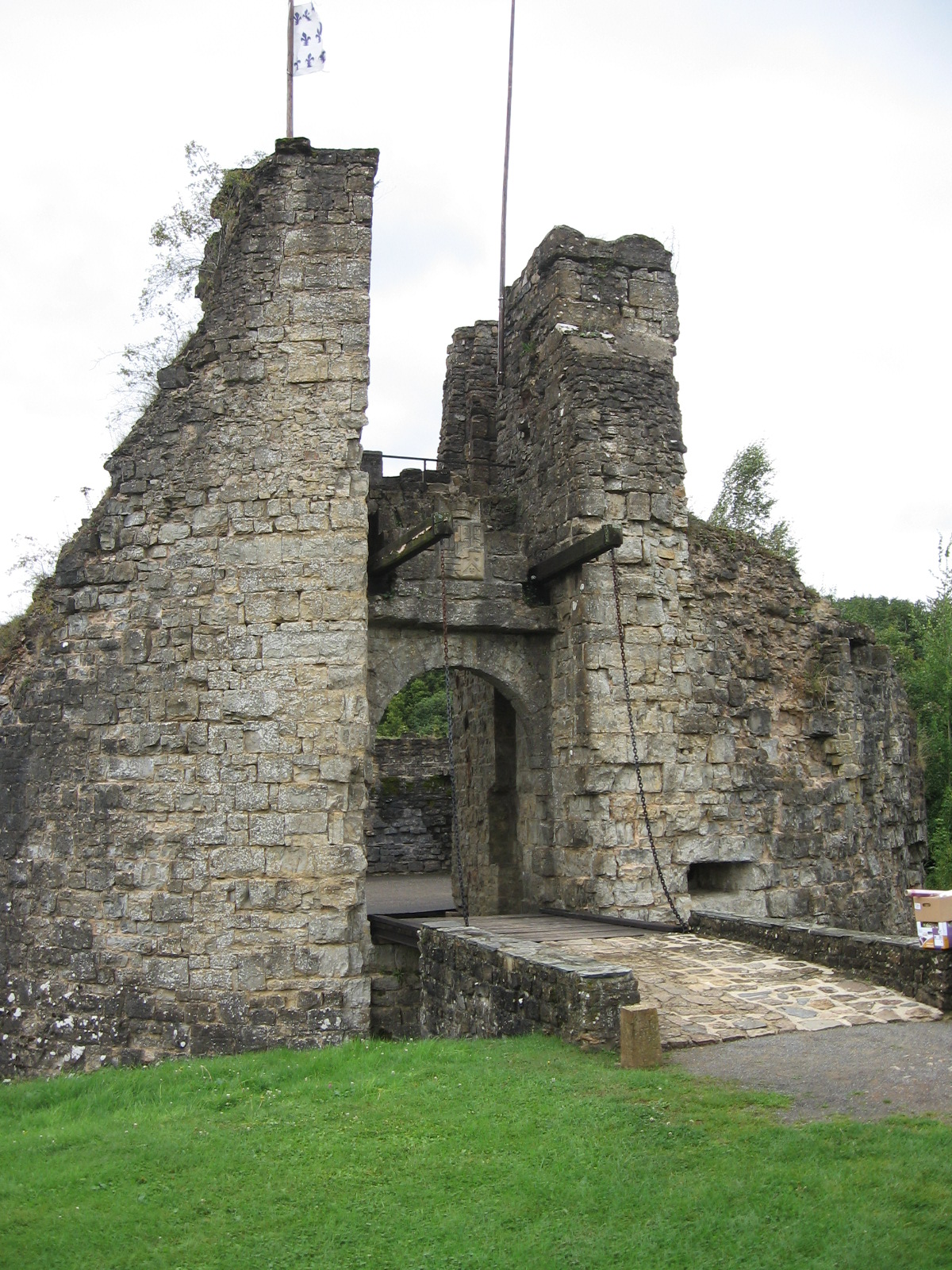 Entrée du Château de Montcornet (08).